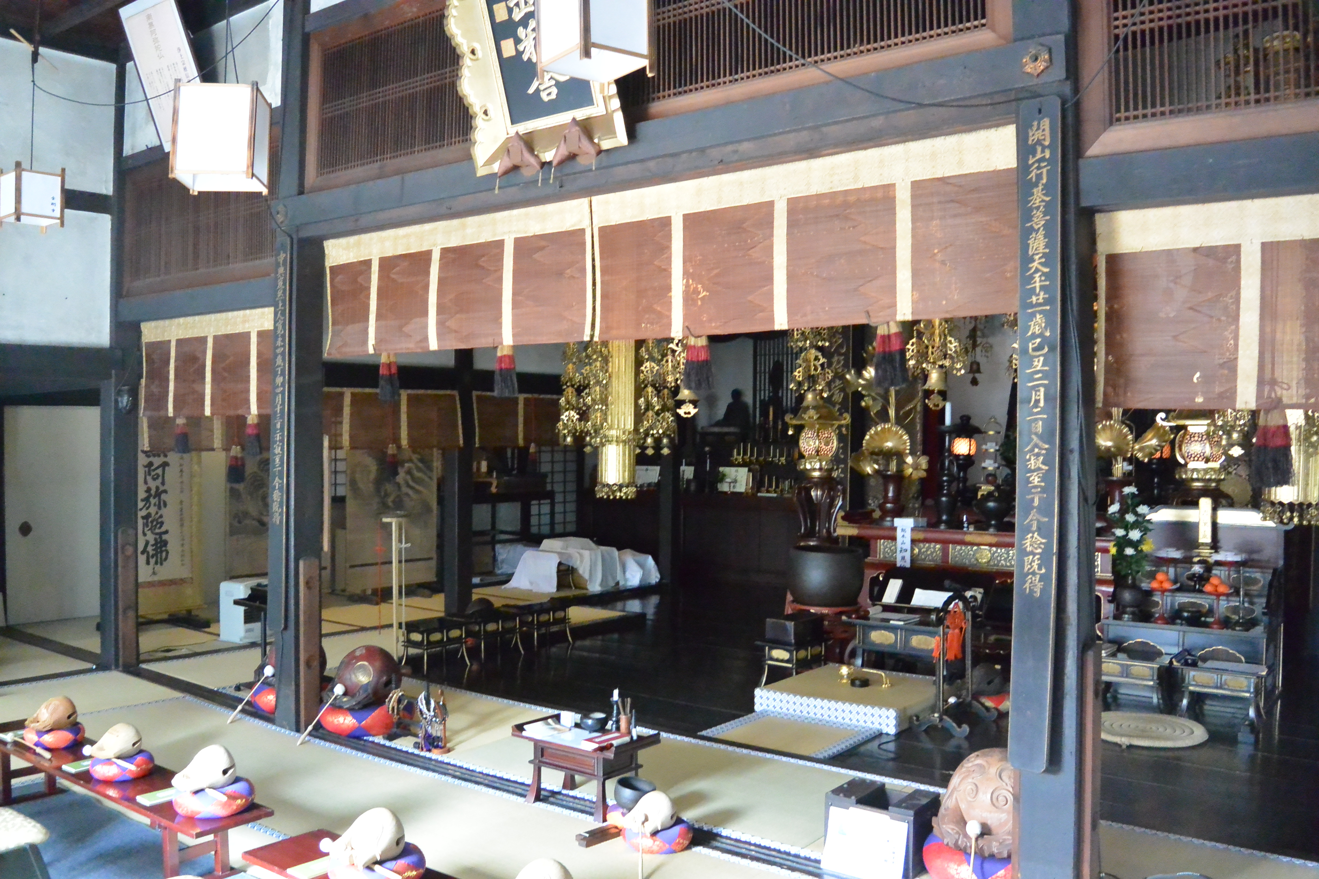 京都市東山区五軒街の金剛地の本堂内部